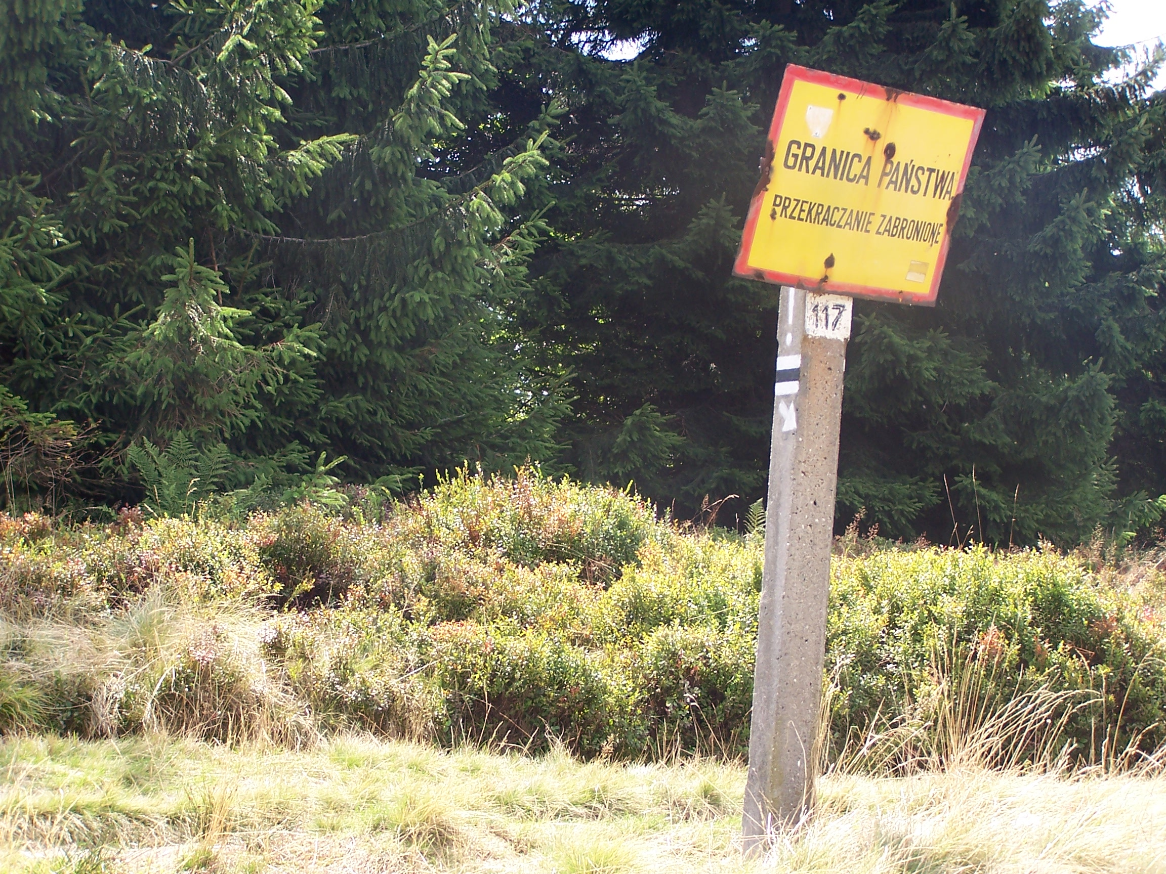 Tablica informacyjna „Granica Państwa - przekraczanie zabronione“ przy linii granicznej na górze Czantoria (Granica Polsko-Czeska).